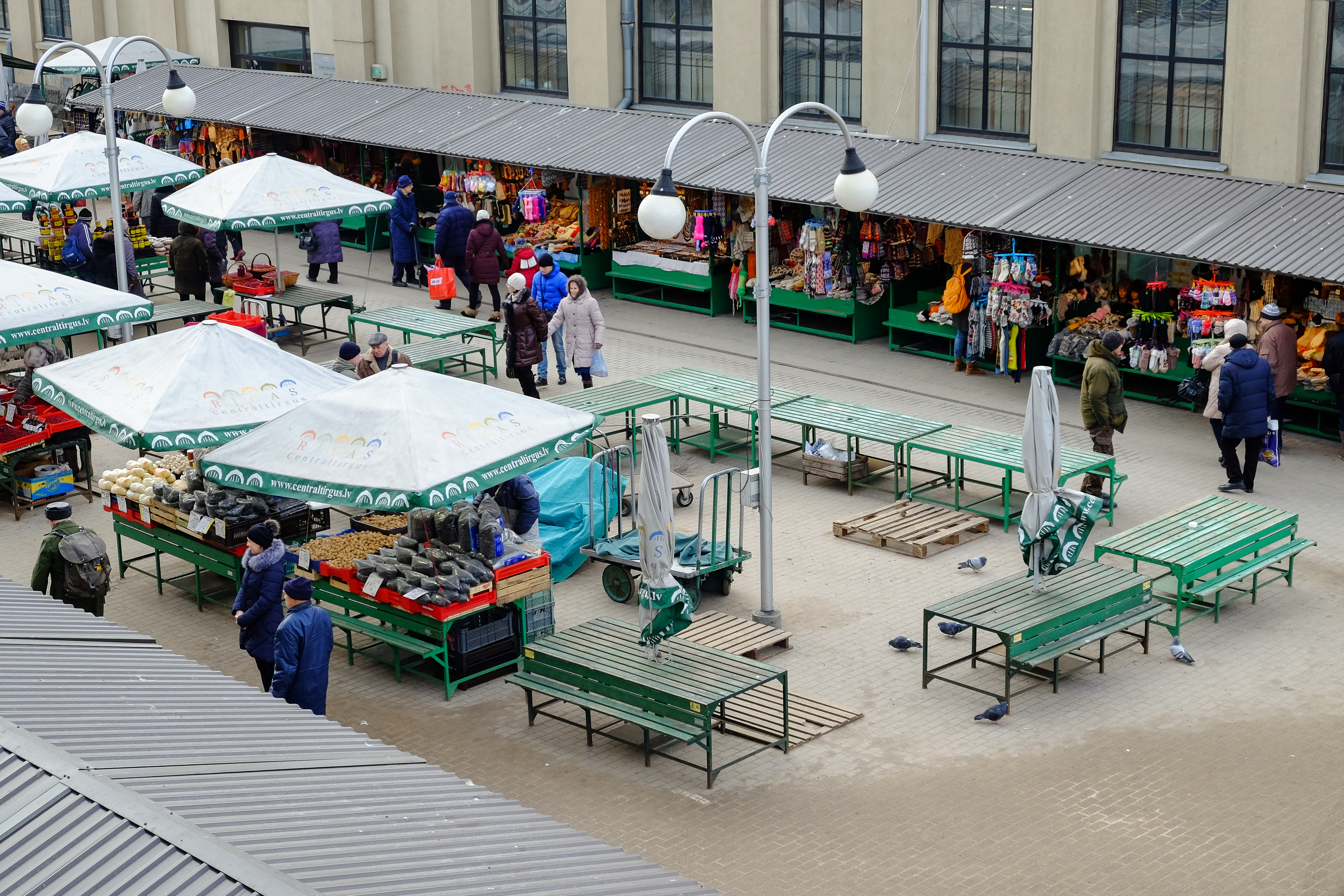 Centrāltirgus paviljonu apbūves ansamblis, Rīga, Nēģu iela 7